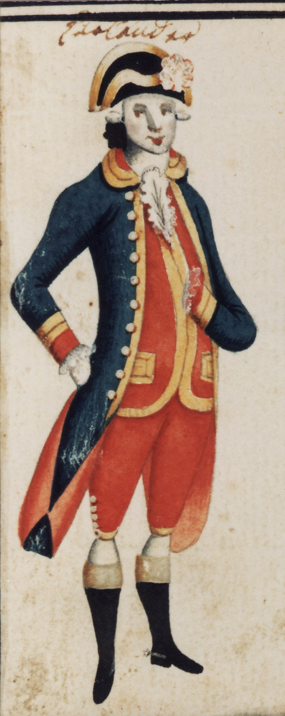 Göttinger Student in der Uniform der Kurländischen Landsmannschaft 1773, Göttingen student in the uniform of the Courland national fraternity 1773